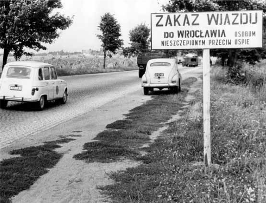 Ospa we Wrocławiu 1963